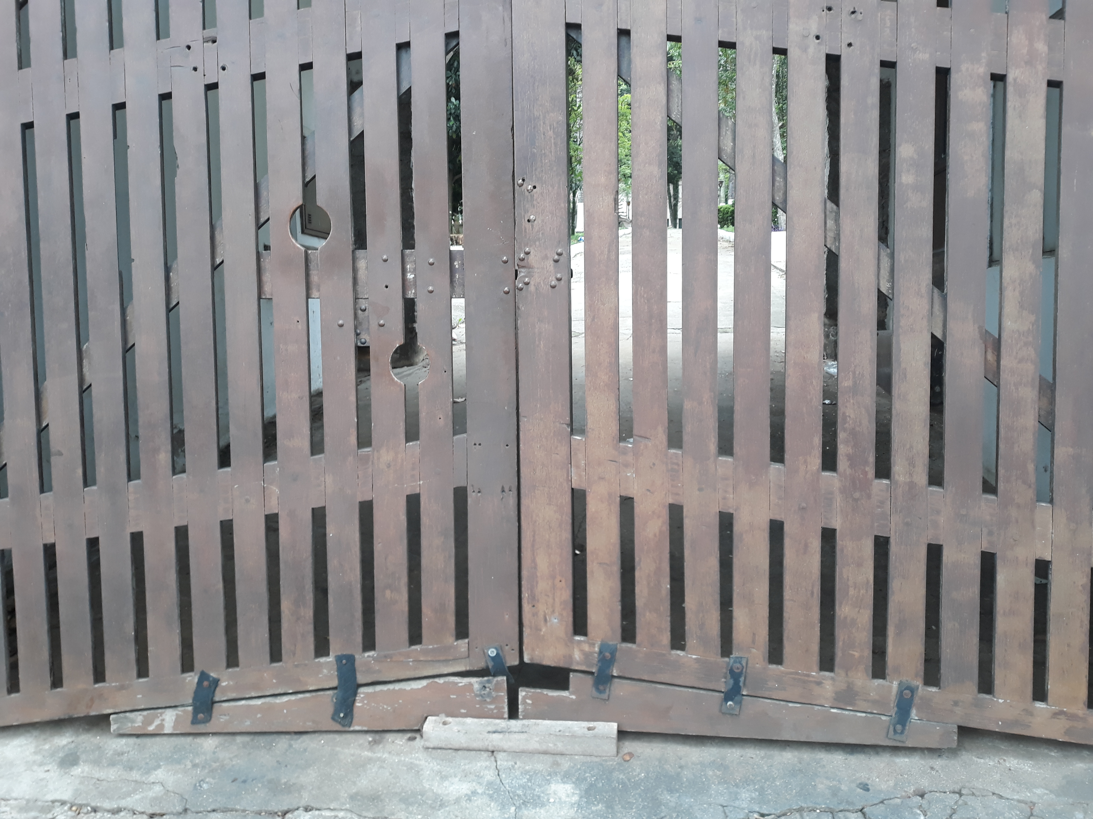 Portão fechado do Casarão Sabbado D'angelo, Rua Sabbado D'angelo, em São Paulo (SP), Brasil.